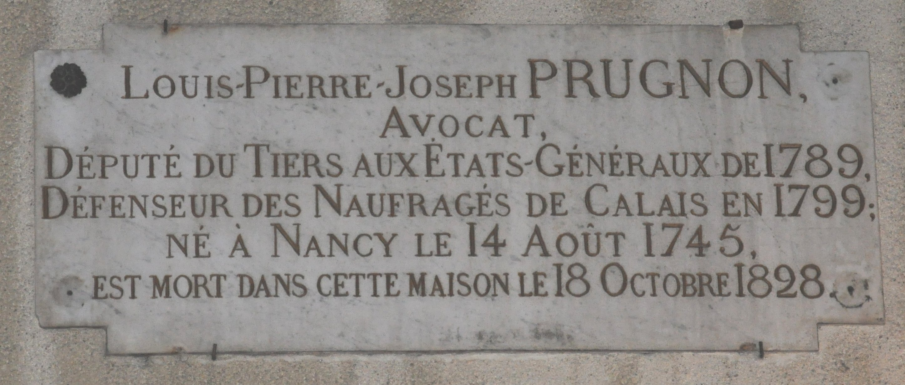 Plaque apposée dans la Grande-Rue de la vieille-ville de Nancy sur la maison où est mort Joseph Prugnon (1745-1828)